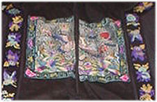 photo partielle du buzy (carré mandarin) du kimono de Catherine Splingaerd-Li, épouse manchoue du mandarin Paul Splingaerd, représentant un envol de grue (plus haut niveau du mandarinat civil à la fin de l'Empire Qing). Collection privée au Vénézuela